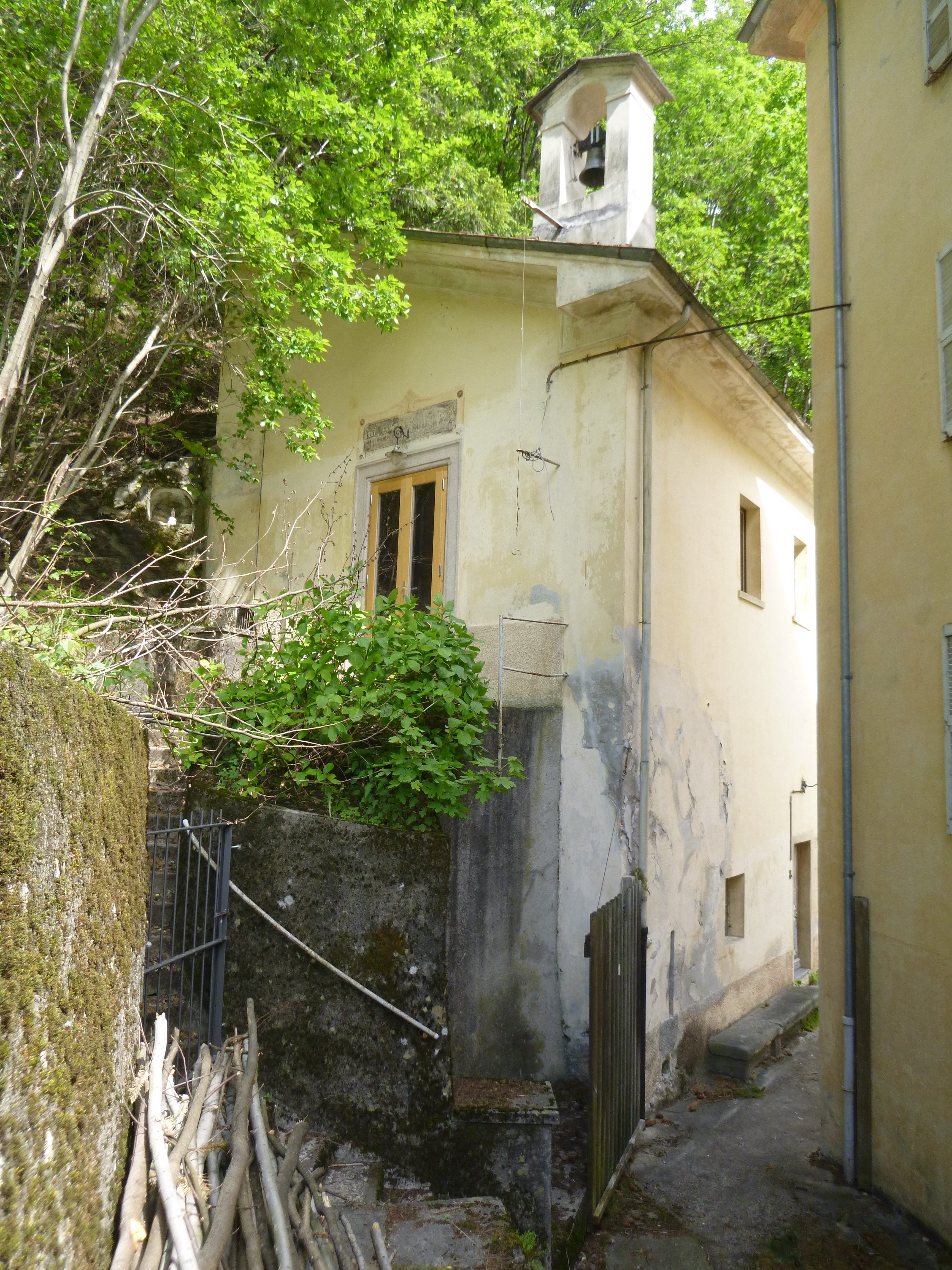 Fabrikkapelle Oratorio San Giuseppe der Cima-Norma S.A.